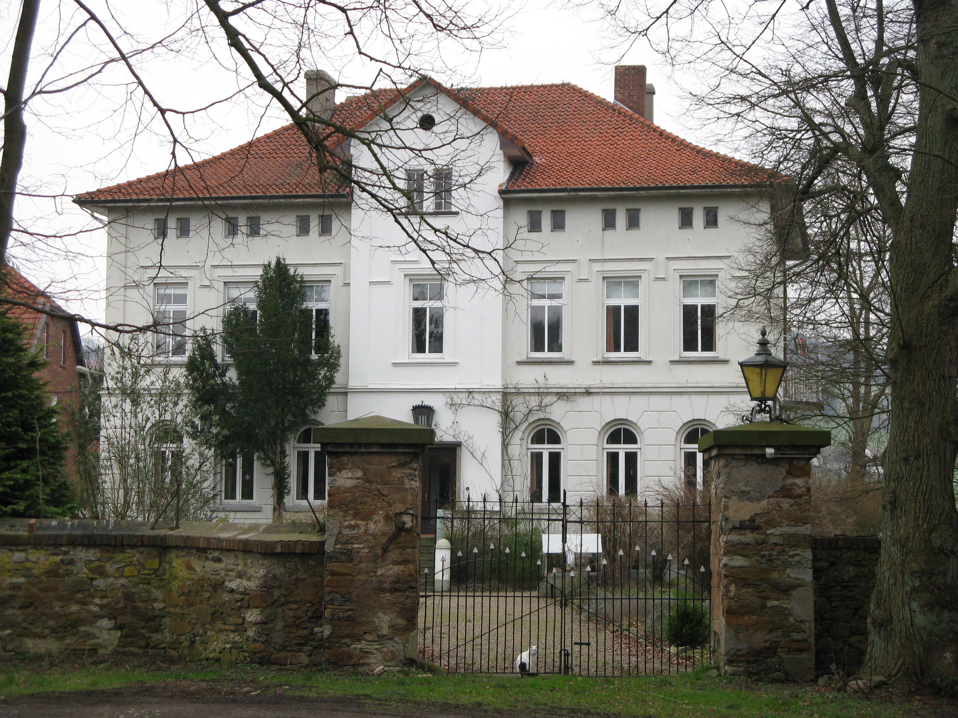 Gut Deesberg